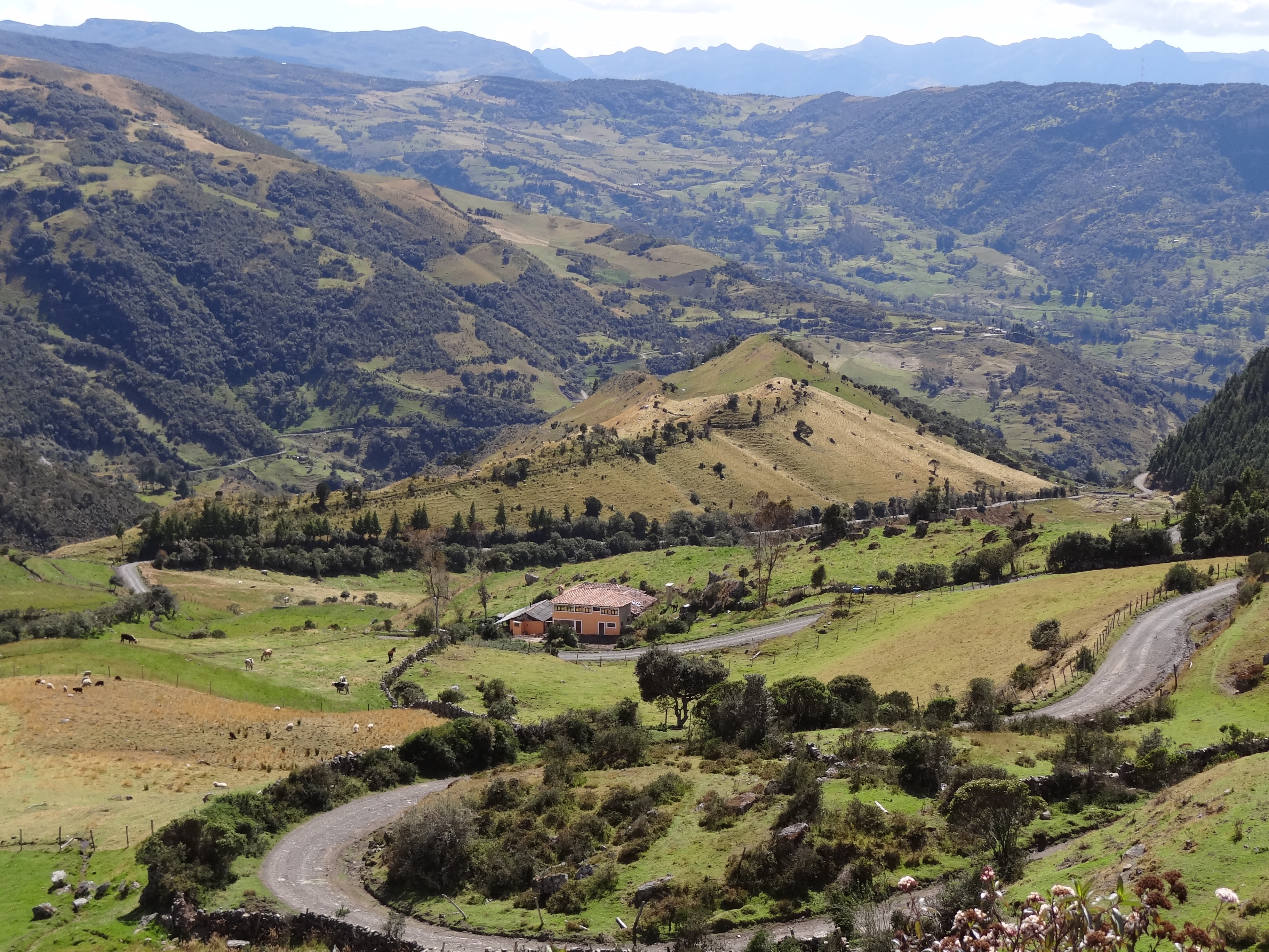 Zona rural de páramo, dedicada a la agricultura y ganadería en el municipio de Guicán, departamento de Boyacá, Colombia.